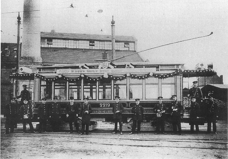 Straßenbahnwagen Nr. 2219 der Linie 164 der »Großen Berliner Straßenbahn AG« im Depot Degnerstraße.